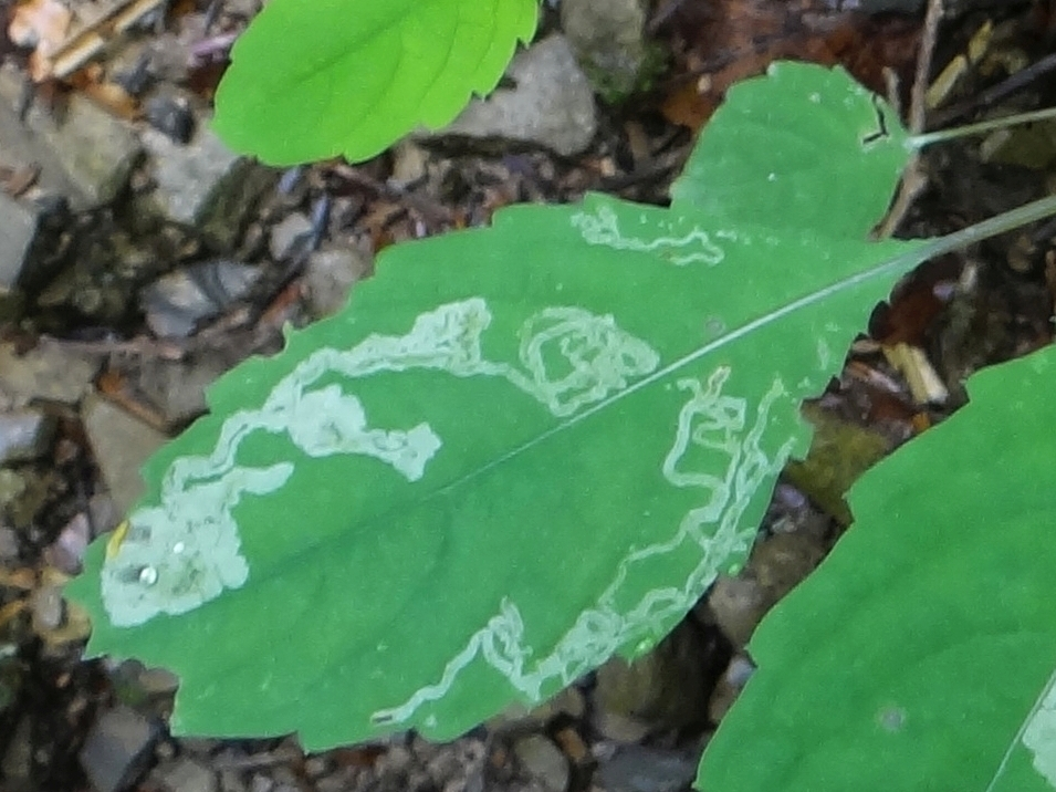 Leaf Impatiens noli-tangere is mined by larva Phytoliriomyza melampyga. Location: Poland, Trzcina, województwo małopolskie